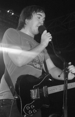 Rhys Jones, Chanteur des Good Shoes ; en première partie des RAKES, 21 avril 2007 à L'Élysée Montmartre - Paris.